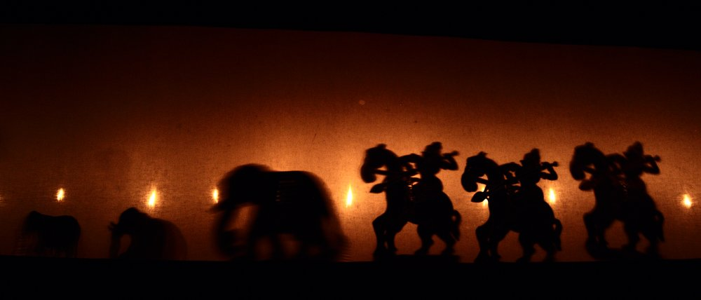 പാവക്കൂത്ത്